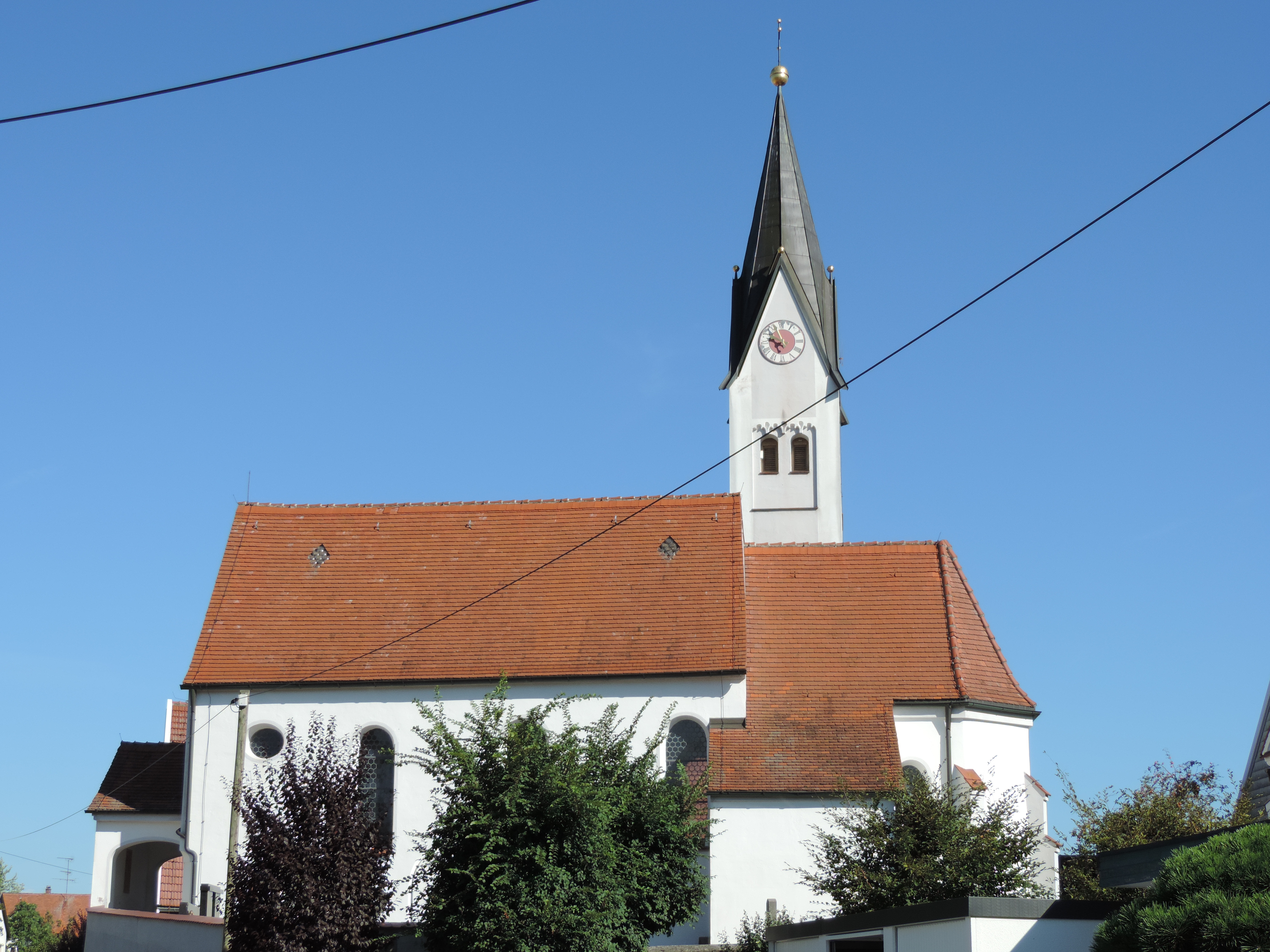 Südansicht